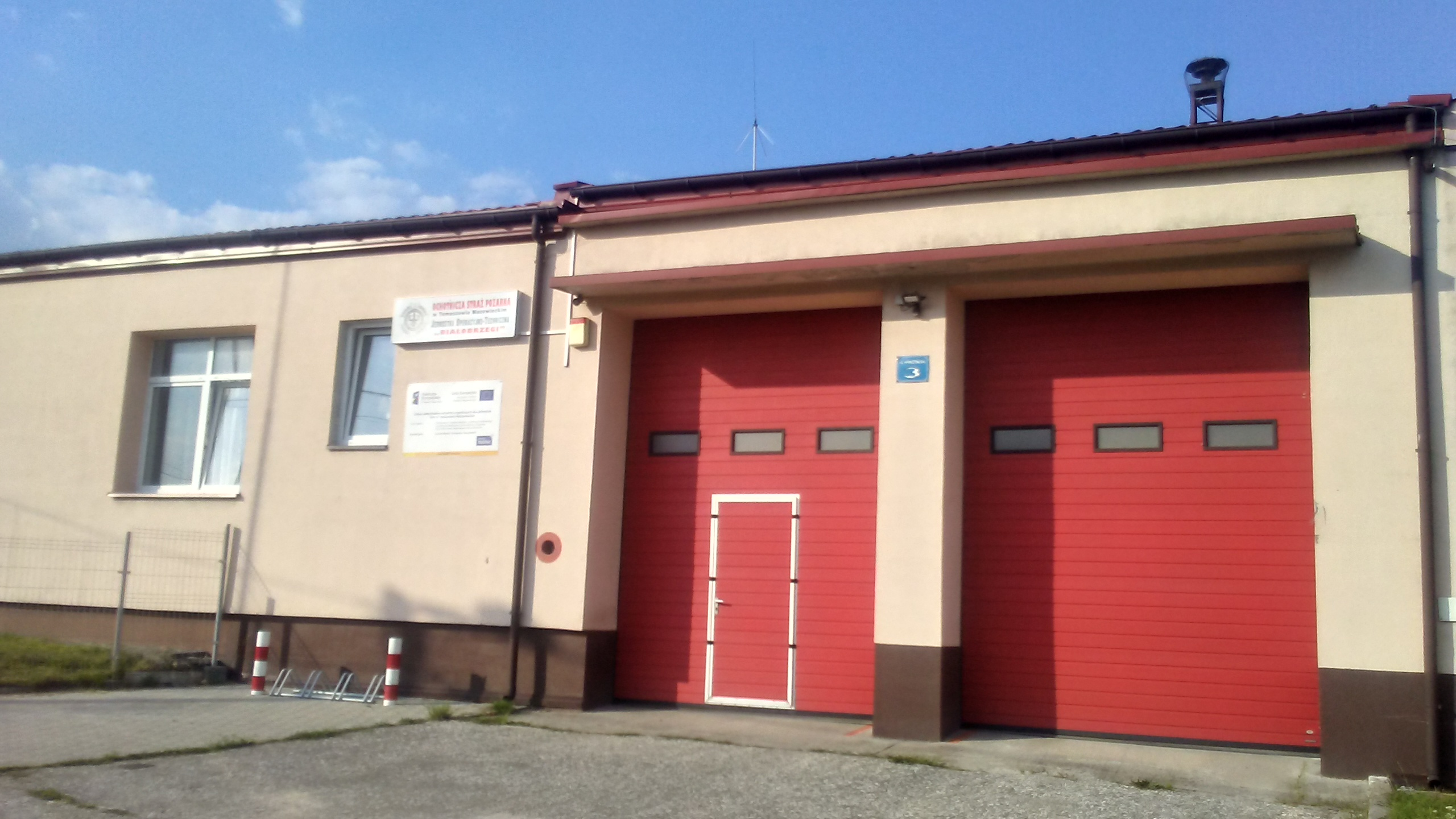 Ochotnicza Straż Pożarna we wschodniej dzielnicy Tomaszowa – Białobrzegach